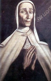 Портрет Серафимы Бога (в миру Пруденции Пиза), основательницы монастырей и мистика. Автор неизвестен.